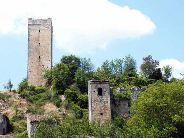 Davide Catini, di Borgorose